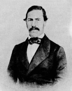 Il botanico Guglielmo Gasparrini